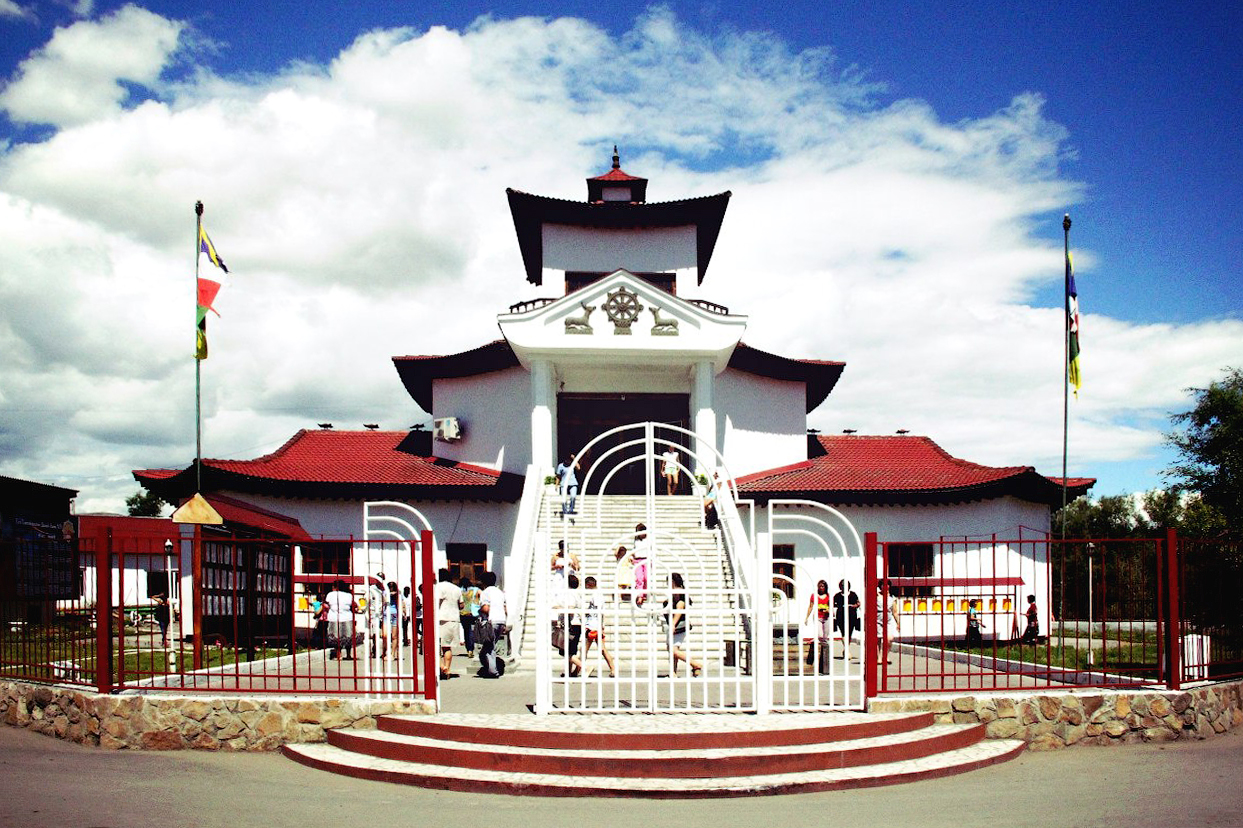 Буддийский храм «Цеченлиг» в Кызыле.